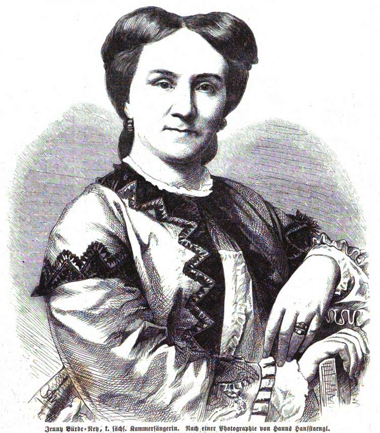 Jenny Bürde-Ney, königlich-sächsische Sängerin, im 19. Jh.